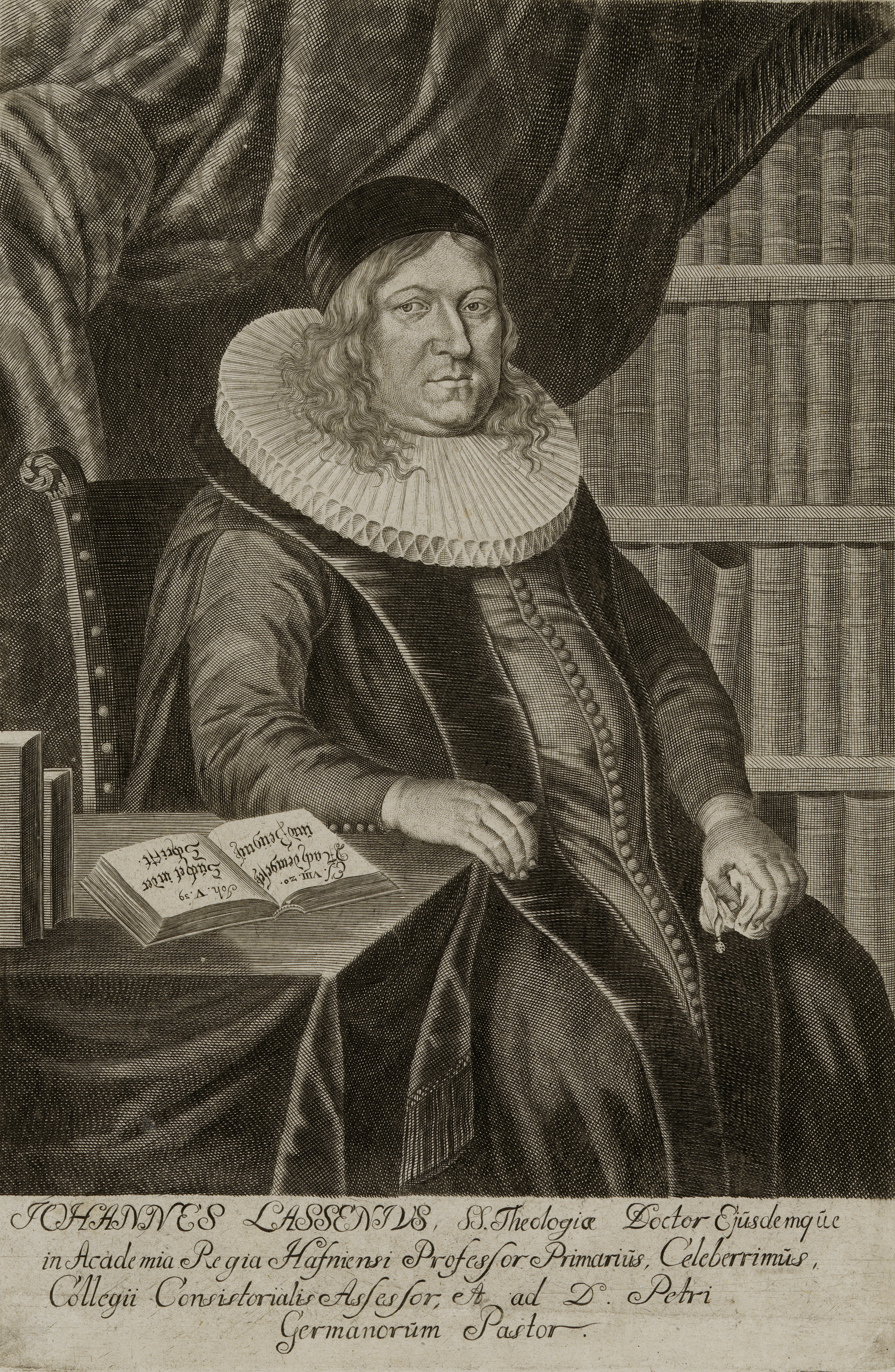 Johannes Lassenius, S. S. Theologiae Doctor Ejusdemque in Aacademica Regia Hasniensi Professor Primarius, Celeberrimus, Collegii Consistorialis Assessor, A. ad D. Petri Germanorum Pastor